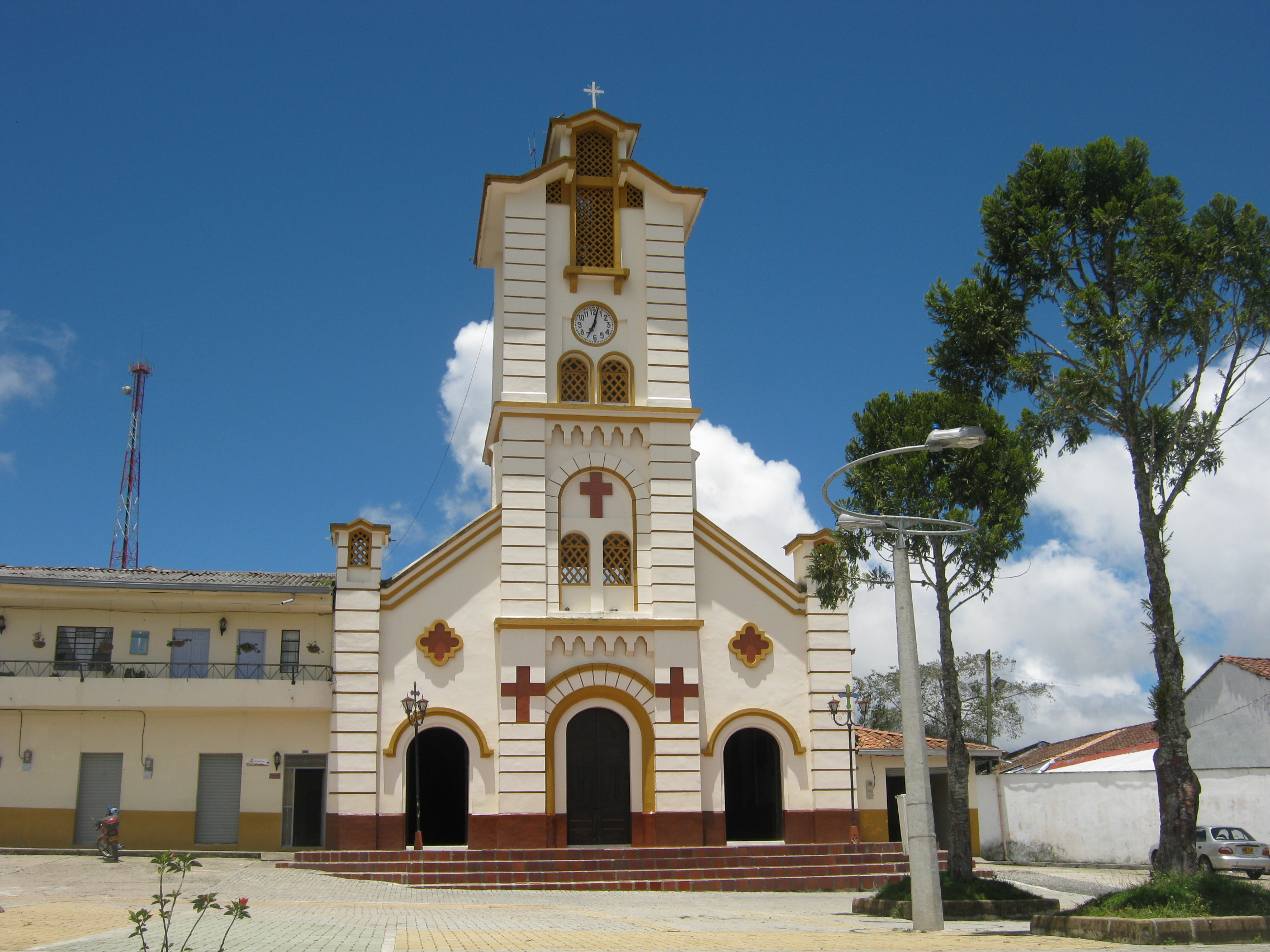 Iglesia y Parque Principal del Corregimiento Mesopotamia, La Unión, Antioquia